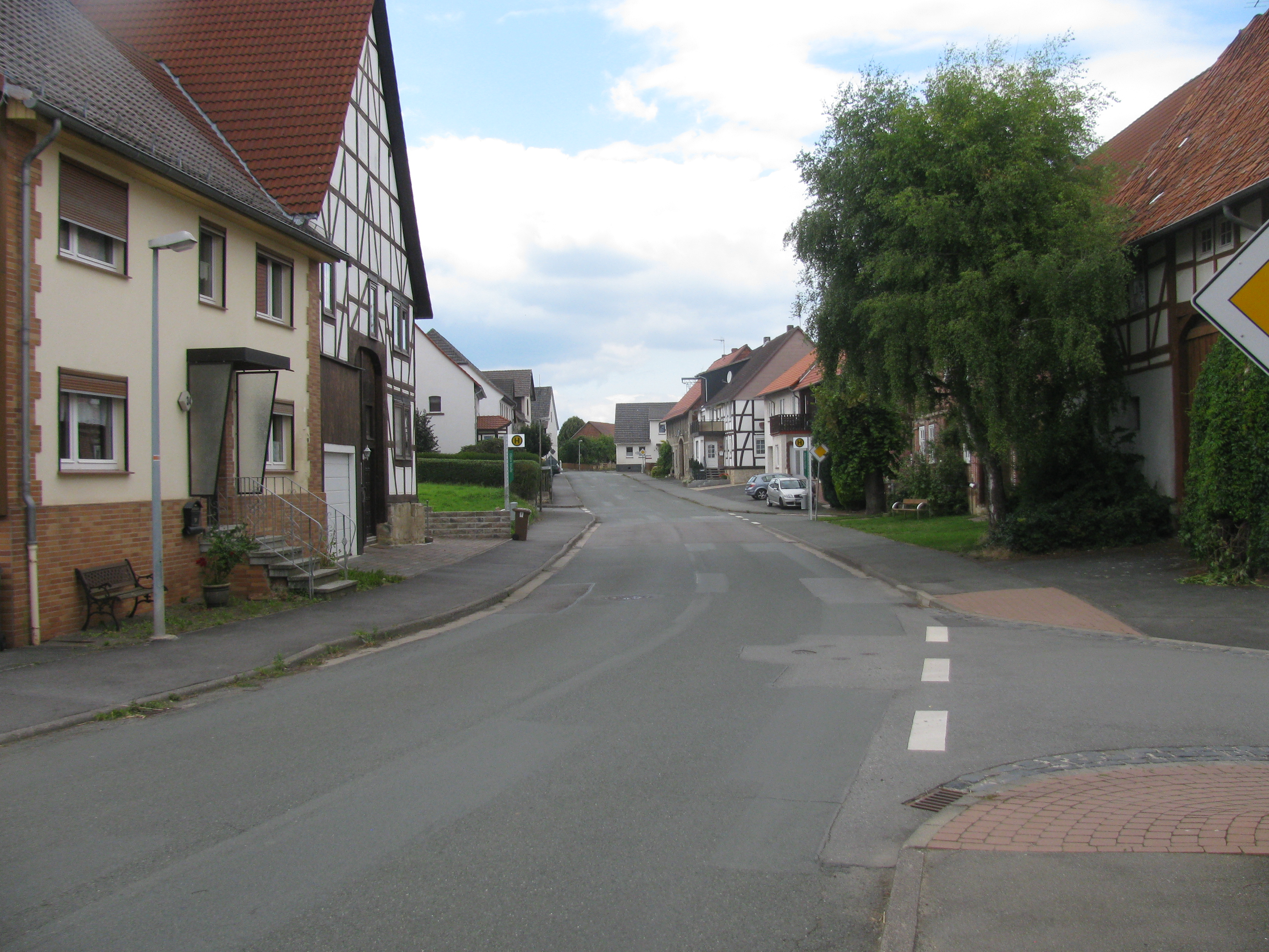 die Bushaltestelle Obere Straße in der Obere Straße in Breuna-Wettesingen, Blickrichtung Westen